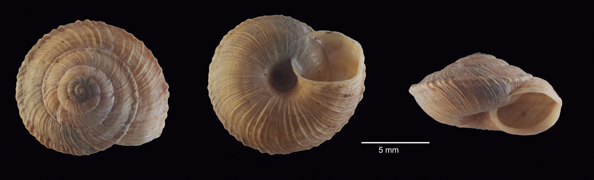 Xerocrassa montserratensis